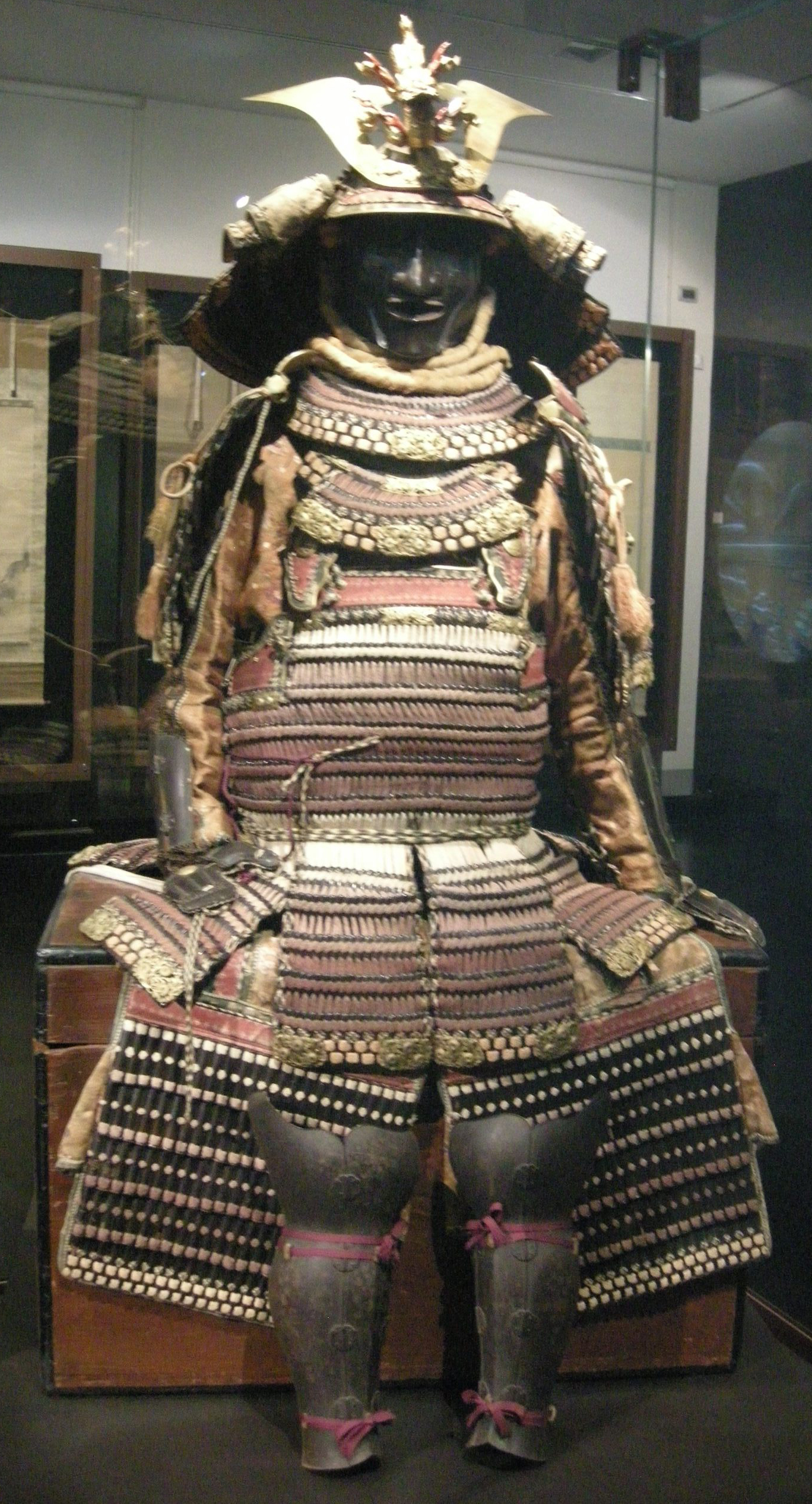 Armatura di samurai, XIX sec.